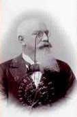 Eduard Skála (1842 - 1918), Rakouský a český politik české národnosti.